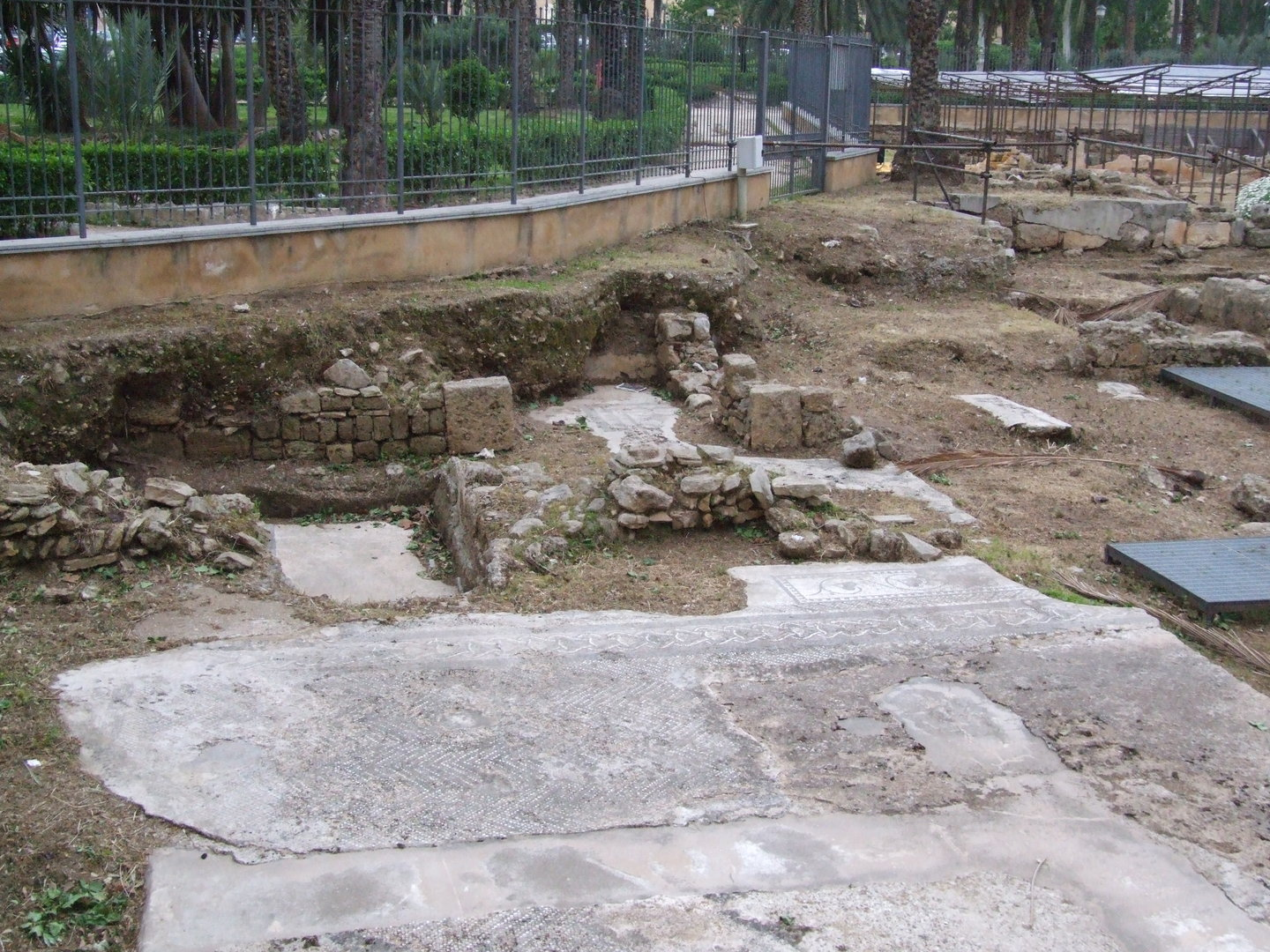 Palermo